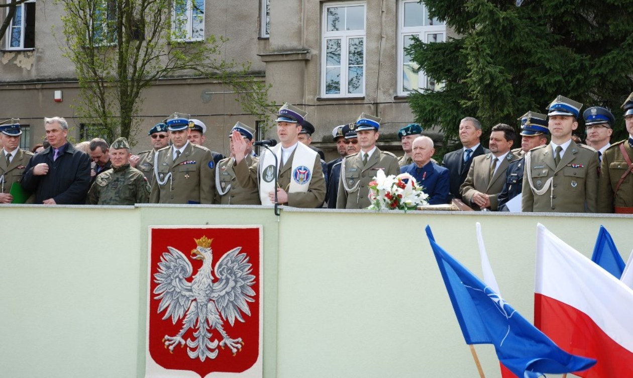 Kapelan wojskowy podczas uroczystości wojskowej w garnizonie Przasnysz